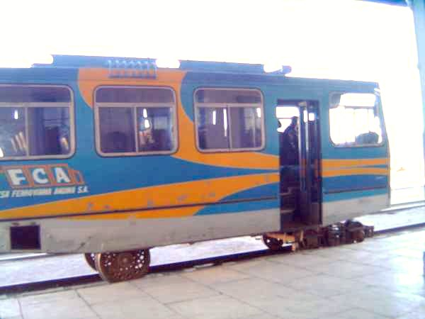 Ferrobus von Empresa Ferroviaria Andina am Bahnhof von Potosí, Bolivien